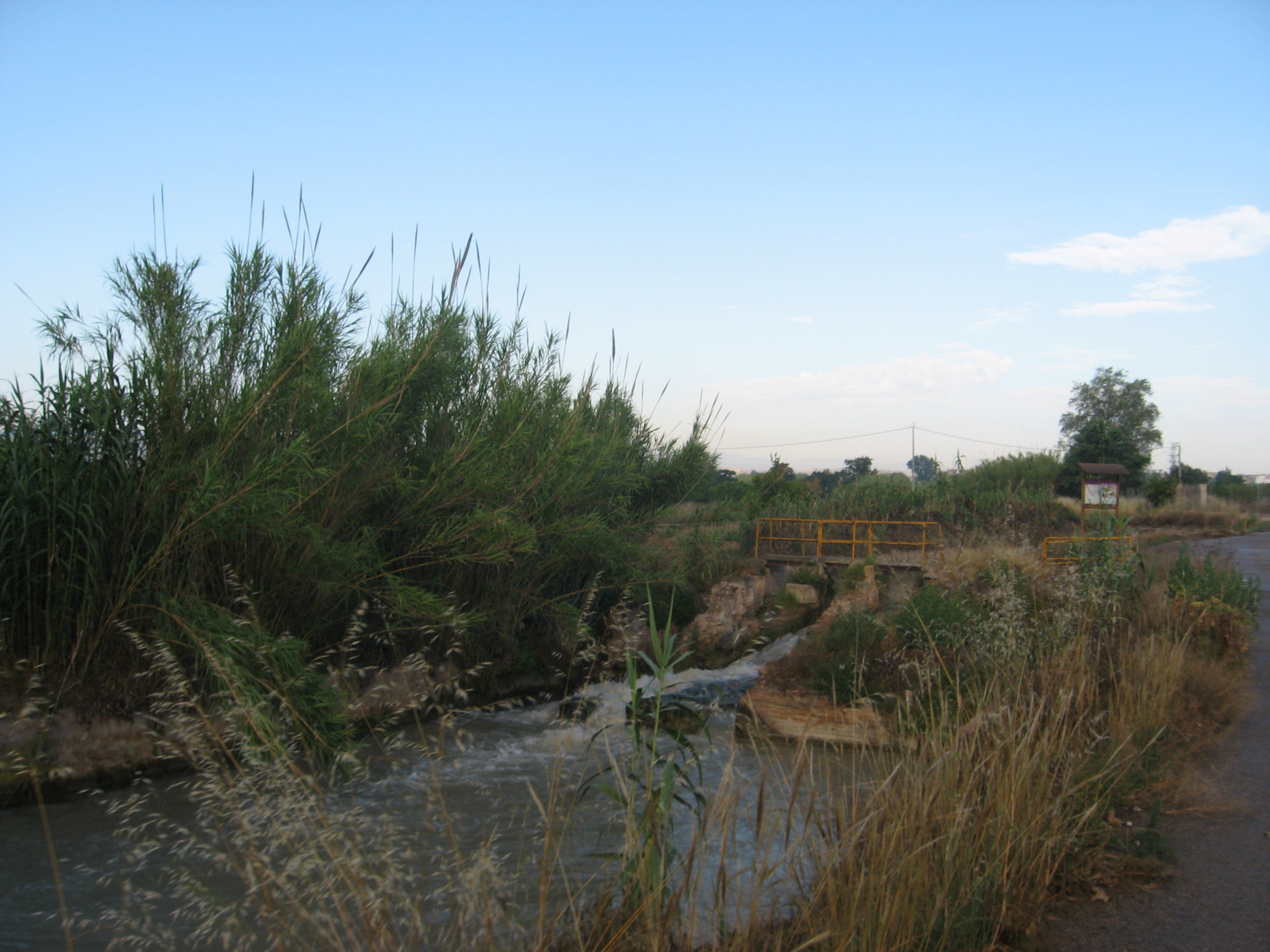 "Partior" en la acequia Aljufia, estas infraestructuras de riego de los árabes siguen funcionando ocho siglos despues, como el primer dia